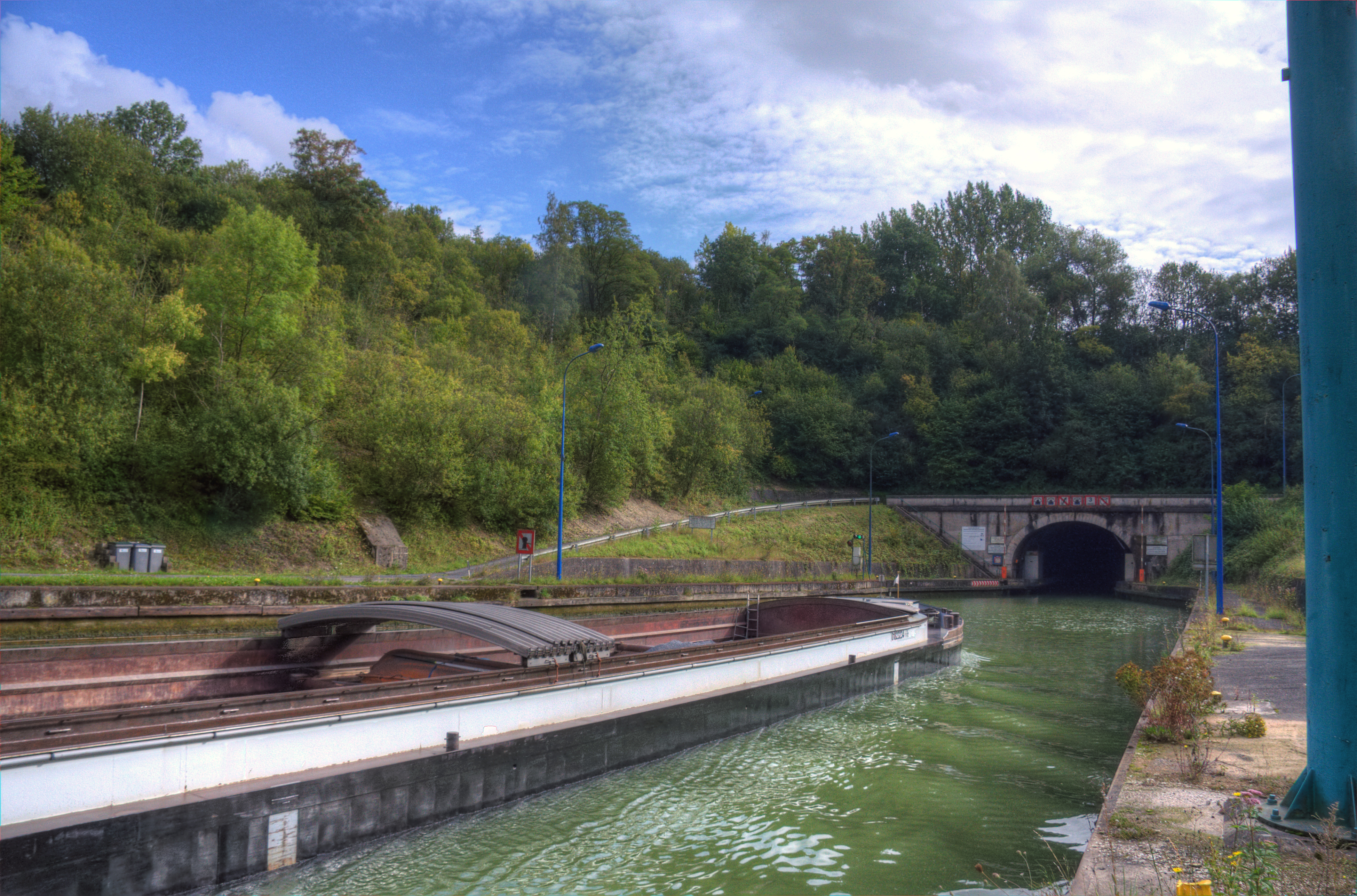 L'entrée du souterrain du canal à Ruyaulcourt